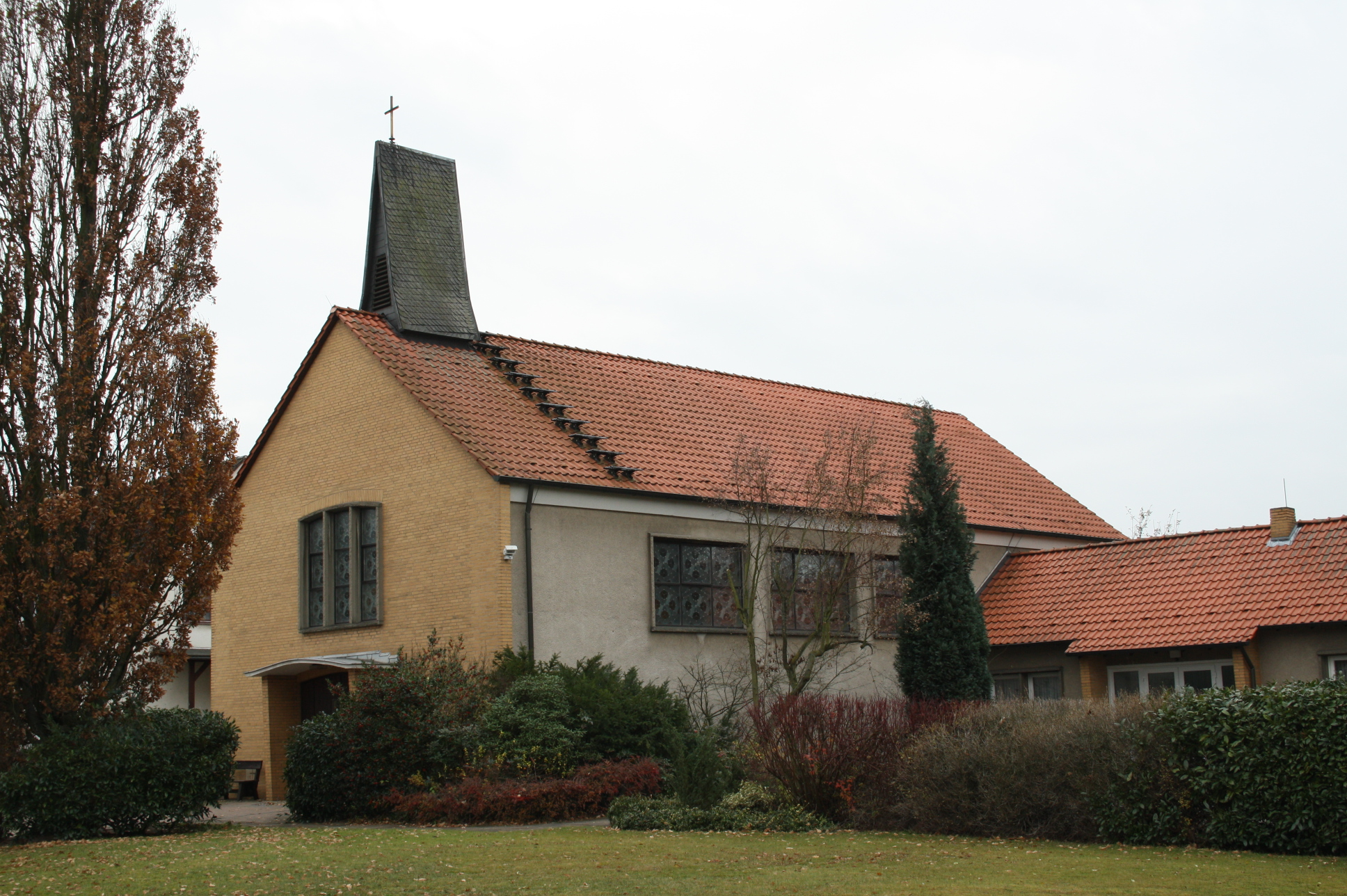 Katholische Kirche "Hl. Dreifaltigkeit"; Bussardweg; D-31275 Lehrte-Hämelerwald